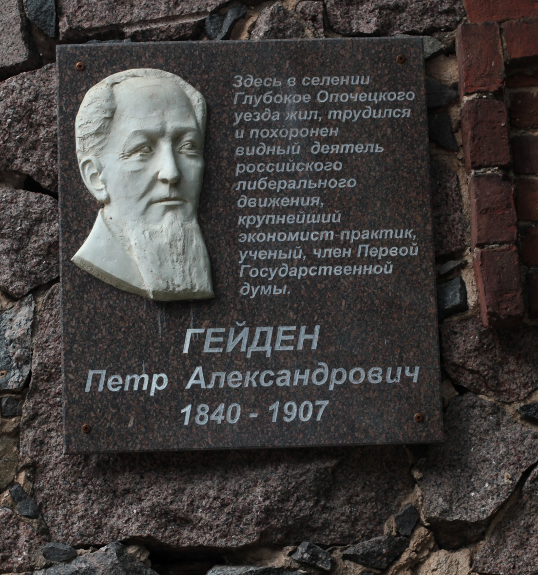 фото сделано во время похода на лошадях